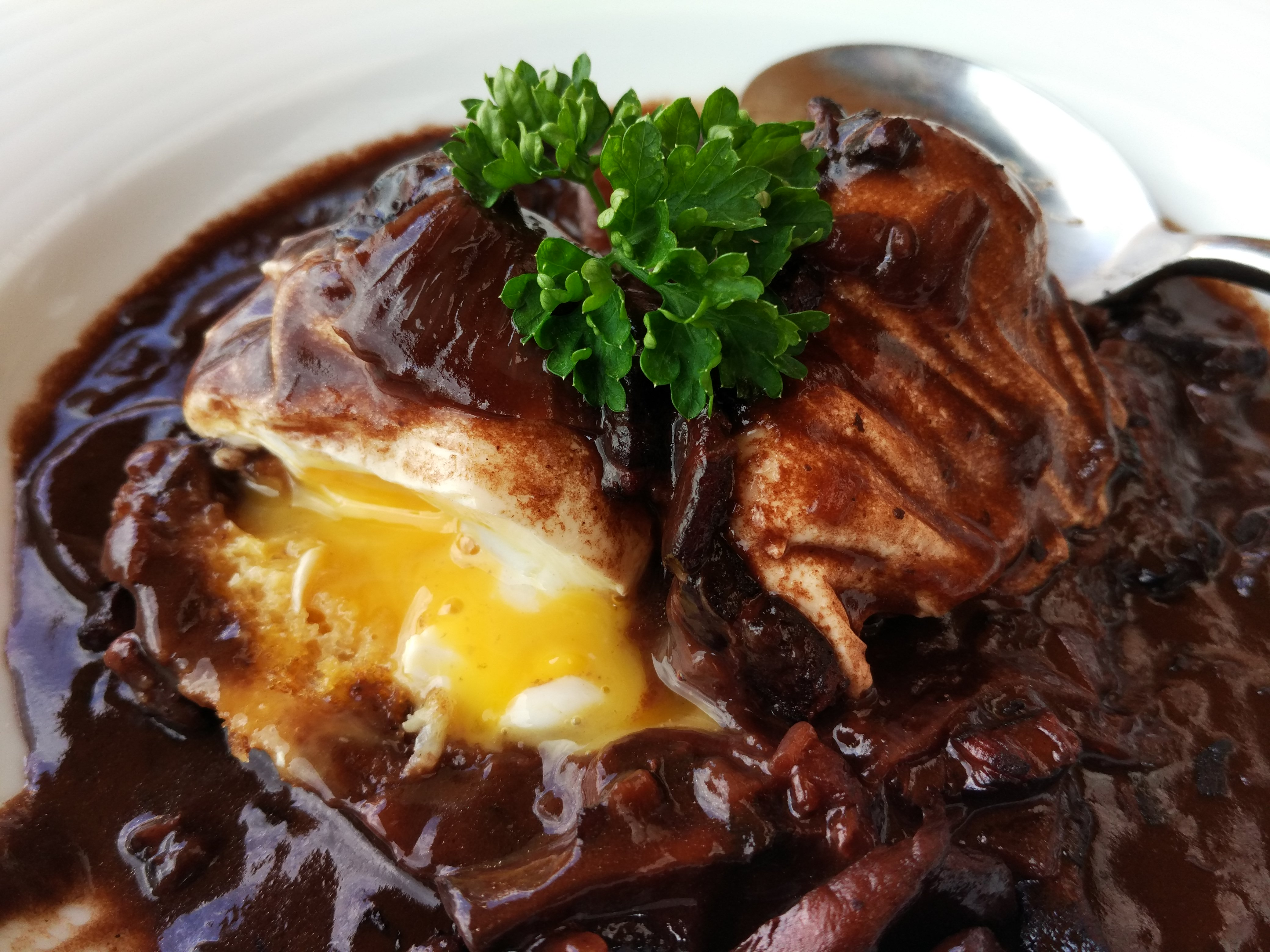 oeuf en meurette, spécialité bourguignonne.